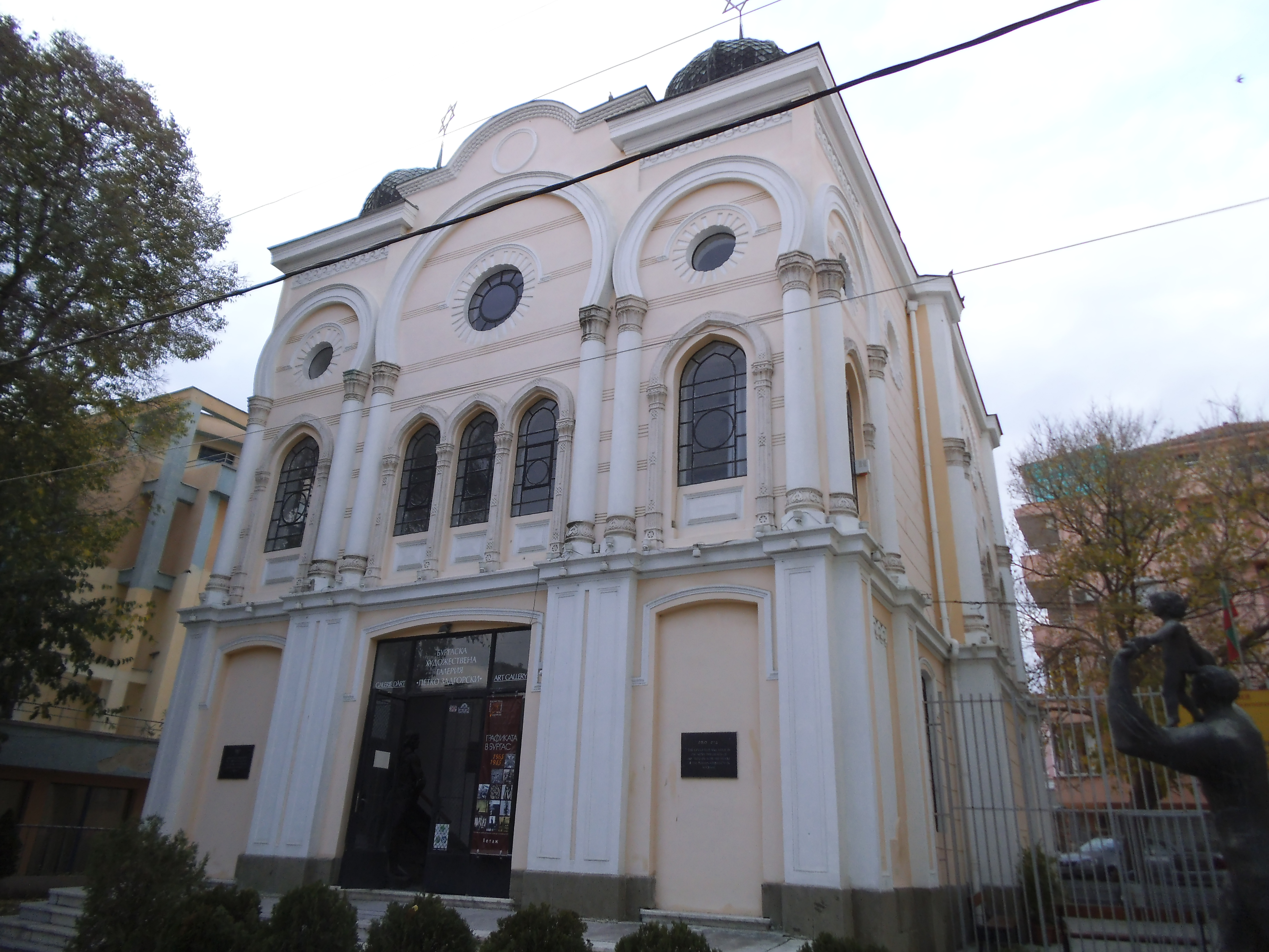 По инициатива на „Алеф“ бургаската художествена галерия /бивша Синагога/ възвръща функциите си на храм. През 2013 г. за първи път от 70 години насам тук е проведена религиозна церемония като част от мемориалната вечер „Памет за спасителите на българските евреи“. След това освещаване в бившата Синагога отново могат да се отслужват религиозни ритуали по канона на юдаизма.